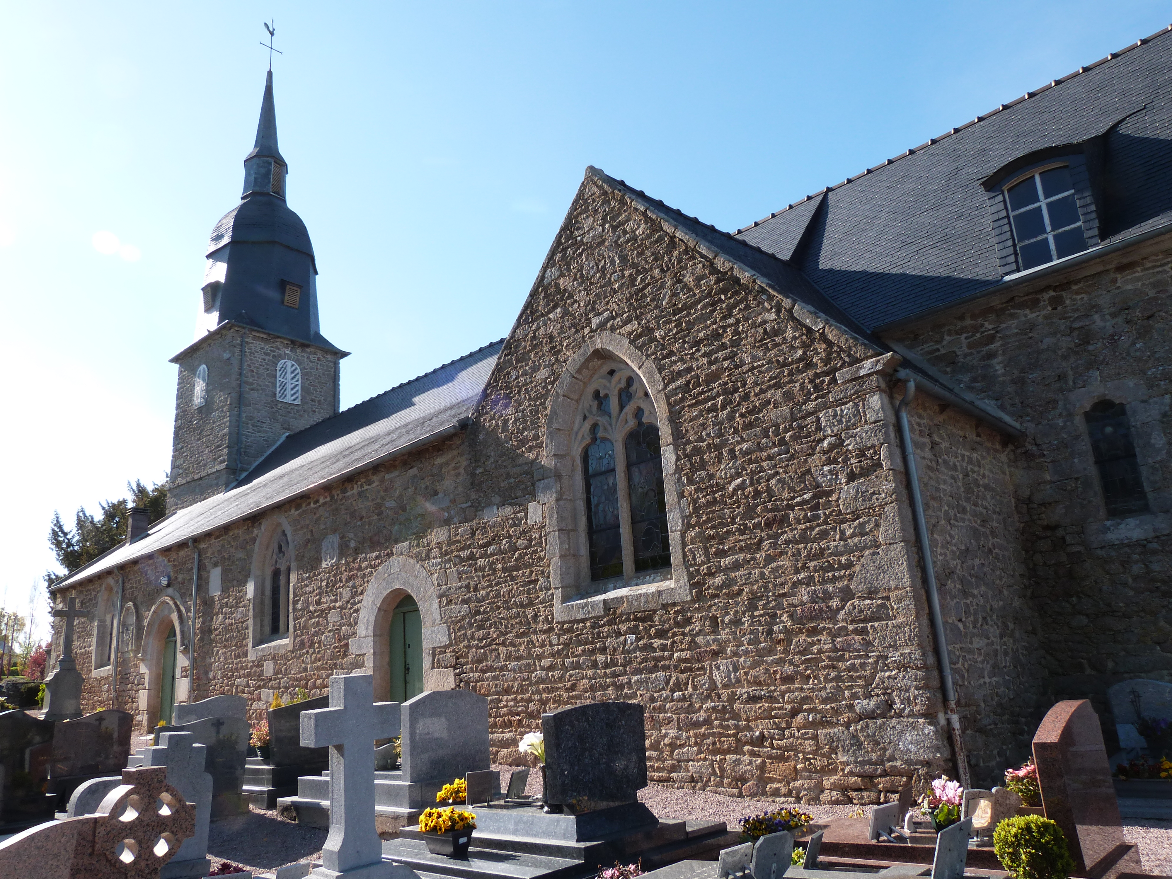 Façade sud de l'église Saint-Event